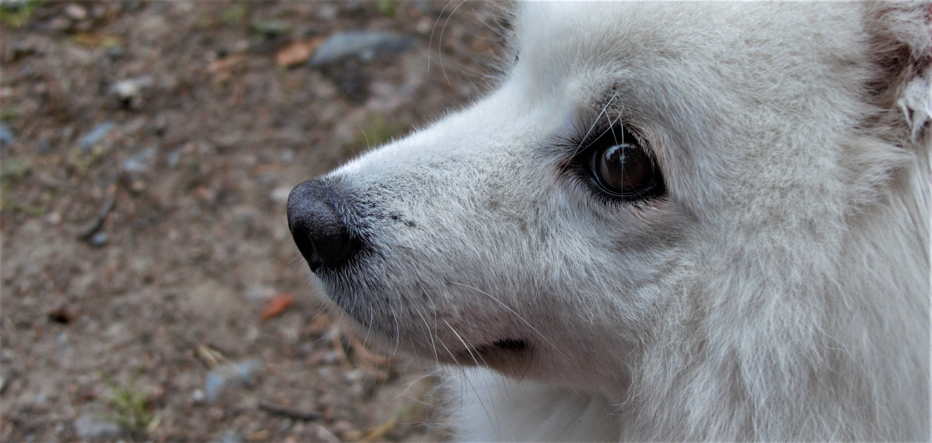 Japaninpystykorva